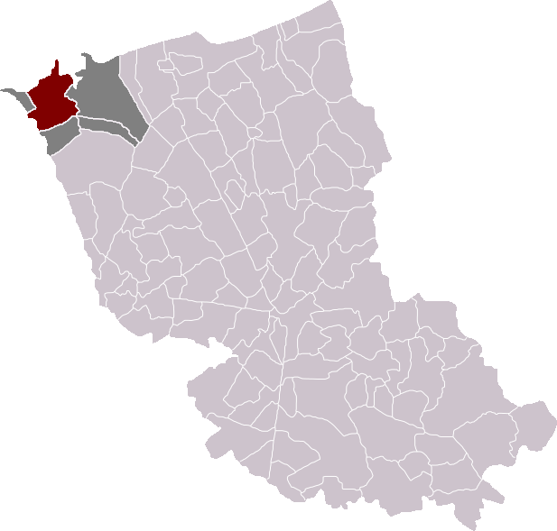 Locatie gemeente Grevelingen in arrondissement Duinkerke. Zelfgemaakt. Location of Gravelines municipality in the arrondissement of Dunkirk. Self made. Localisation de la commune de Gravelines dans l'arrondissement de Dunkerque. Fait moi-même.